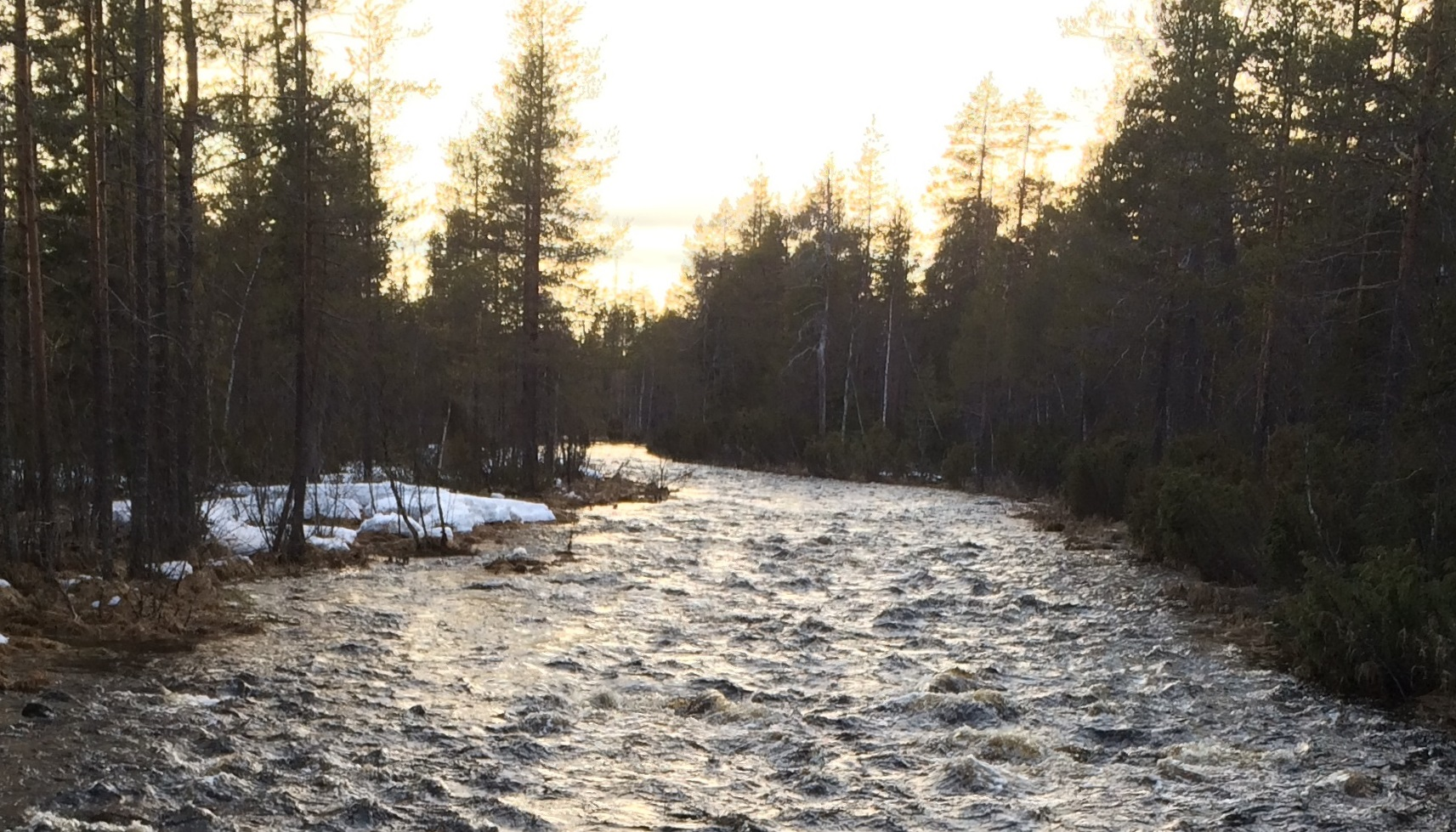 Коккойоки